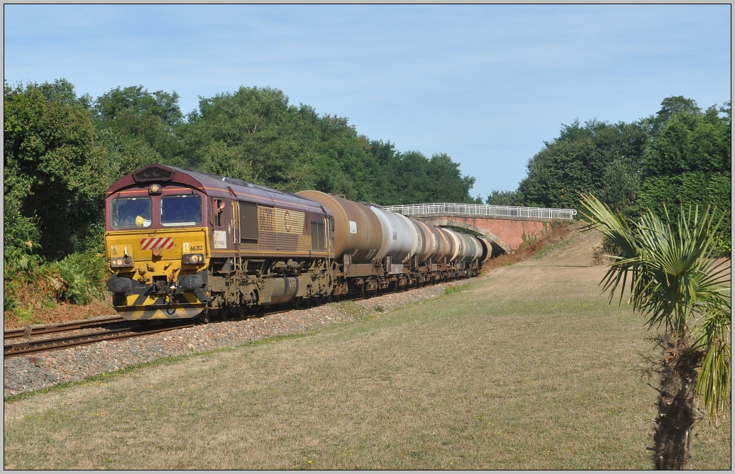 Train ECR Donges Poitiers à Nesmy le 13 août 2016 - Class 66